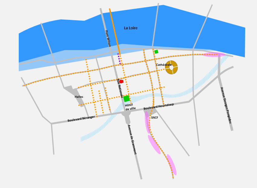 restitution du plan de Caesarodunum (Tours) au IIe siècle